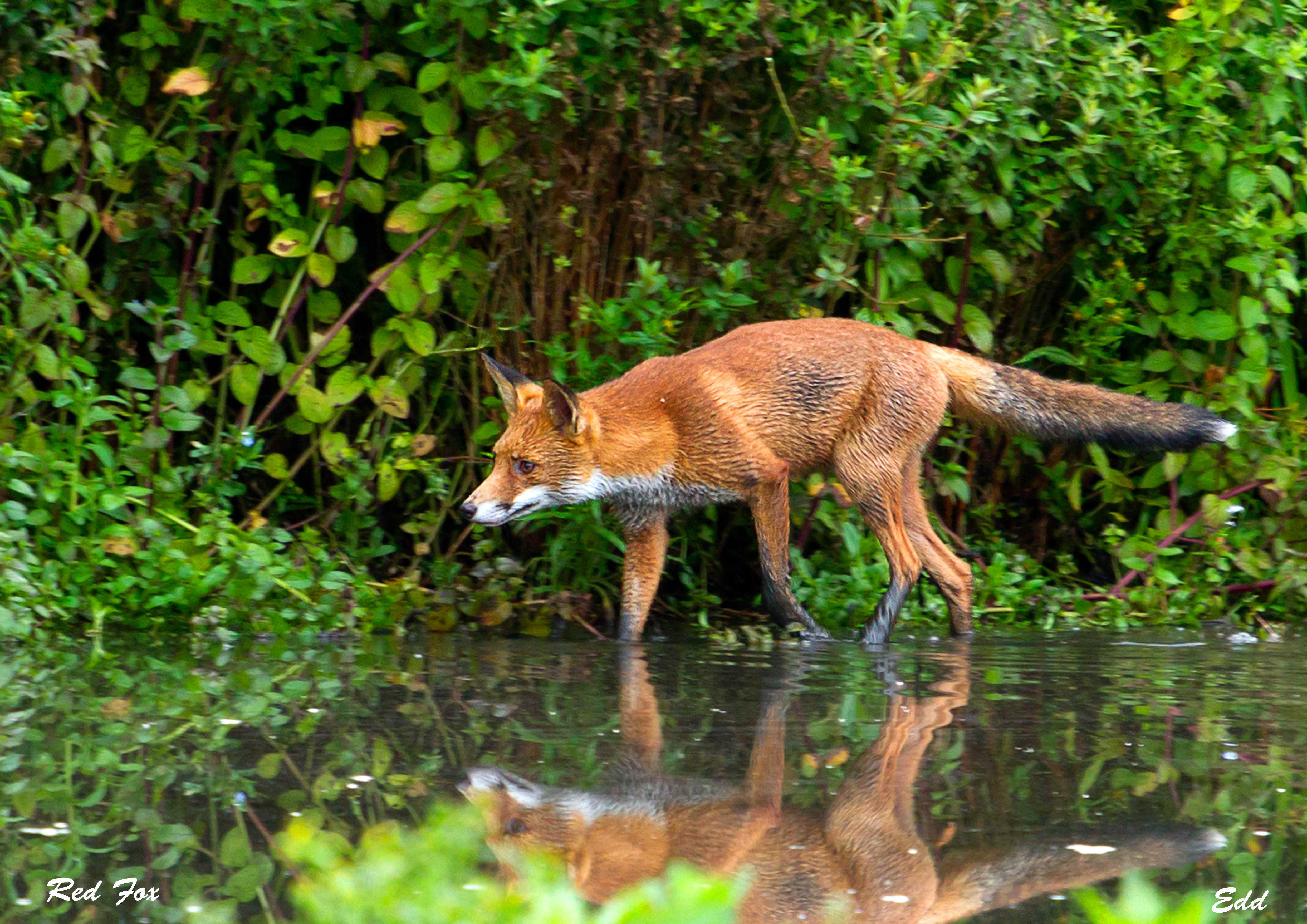 Renard roux marchant lentement dans l'eau.